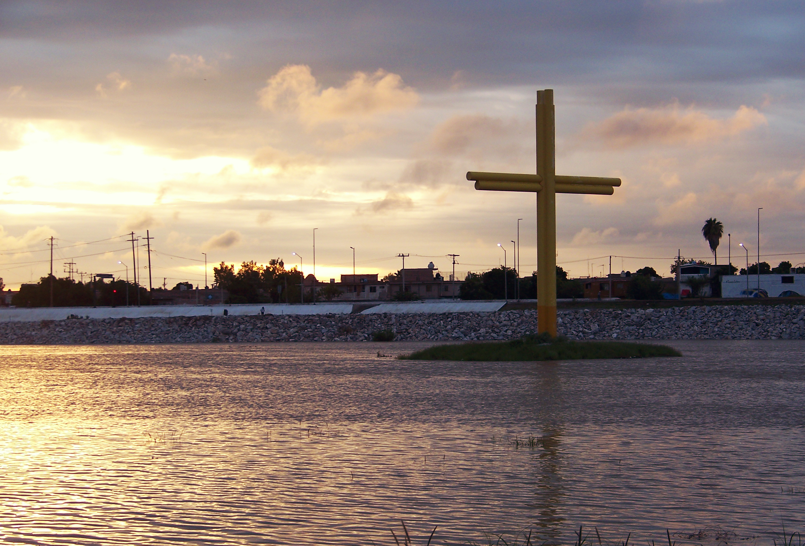 Una fotografía del cauce (ahora inactivo) del río Nazas que divide la ciudad de Gómez Palacio Dgo. y Torreón Coah.